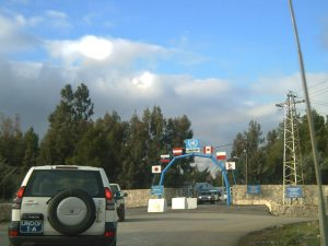 Dowództwo UNDOF - Camp Faouar